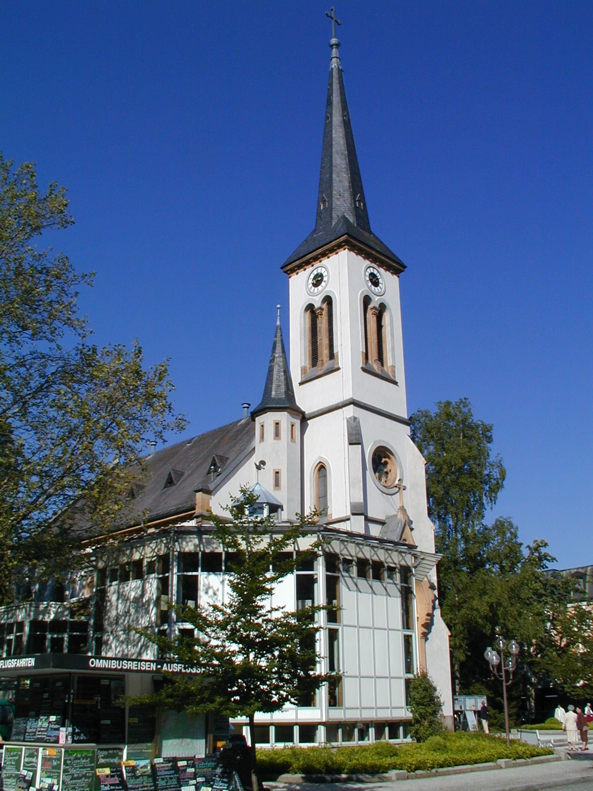 Evangelische Stadtkirche Bad Reichenhall Ansicht von Osten (Kurstraße) mit Glockenturm